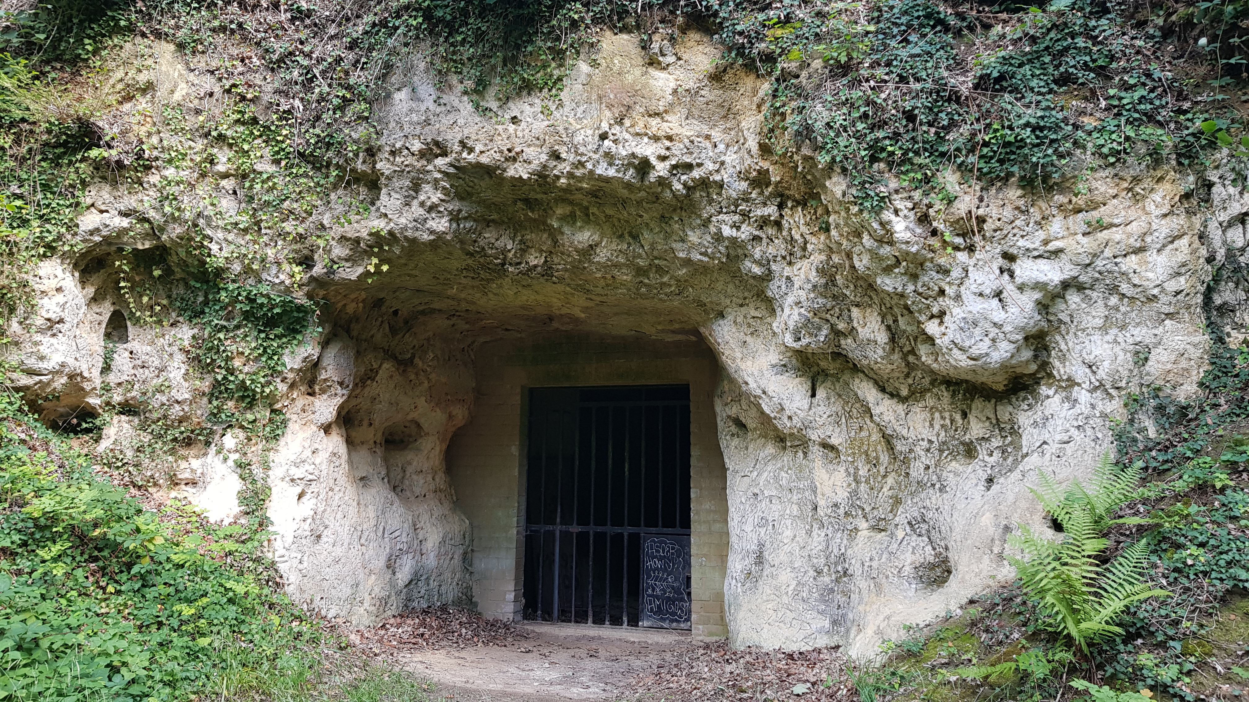 Barakkengroeve, Geulhem, Nederland